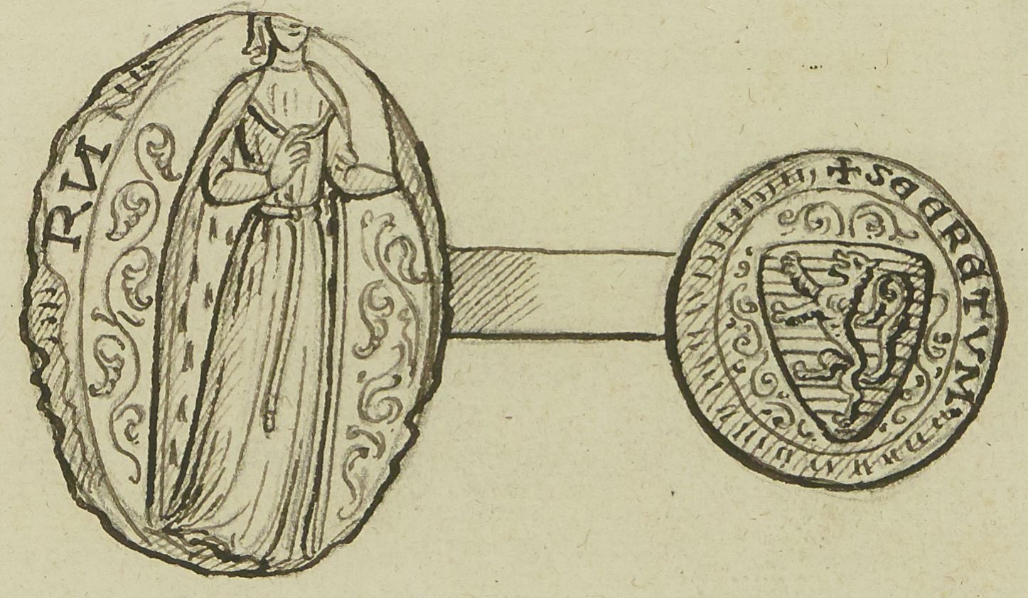 Sceau et sceau du secret de Bourgogne de Rancon (décédée ca. 1169), dame de Lusignan et de Vouvant. Description du sceau de Bourgogne de Rancon : Dame debout, de trois quarts à droite, la tête couverte par un voile court. Sa robe longue est serrée à la taille par une ceinture pendante assez longue. Elle porte un manteau d'hermine dont elle retient le cordon de la main droite. Champ de rinceaux. Description du sceau du secret de Bourgogne de Rancon : Sceau armorial à l"écu burelé de dix-huit pièces au lion rampant. Champ semé de rinceaux.